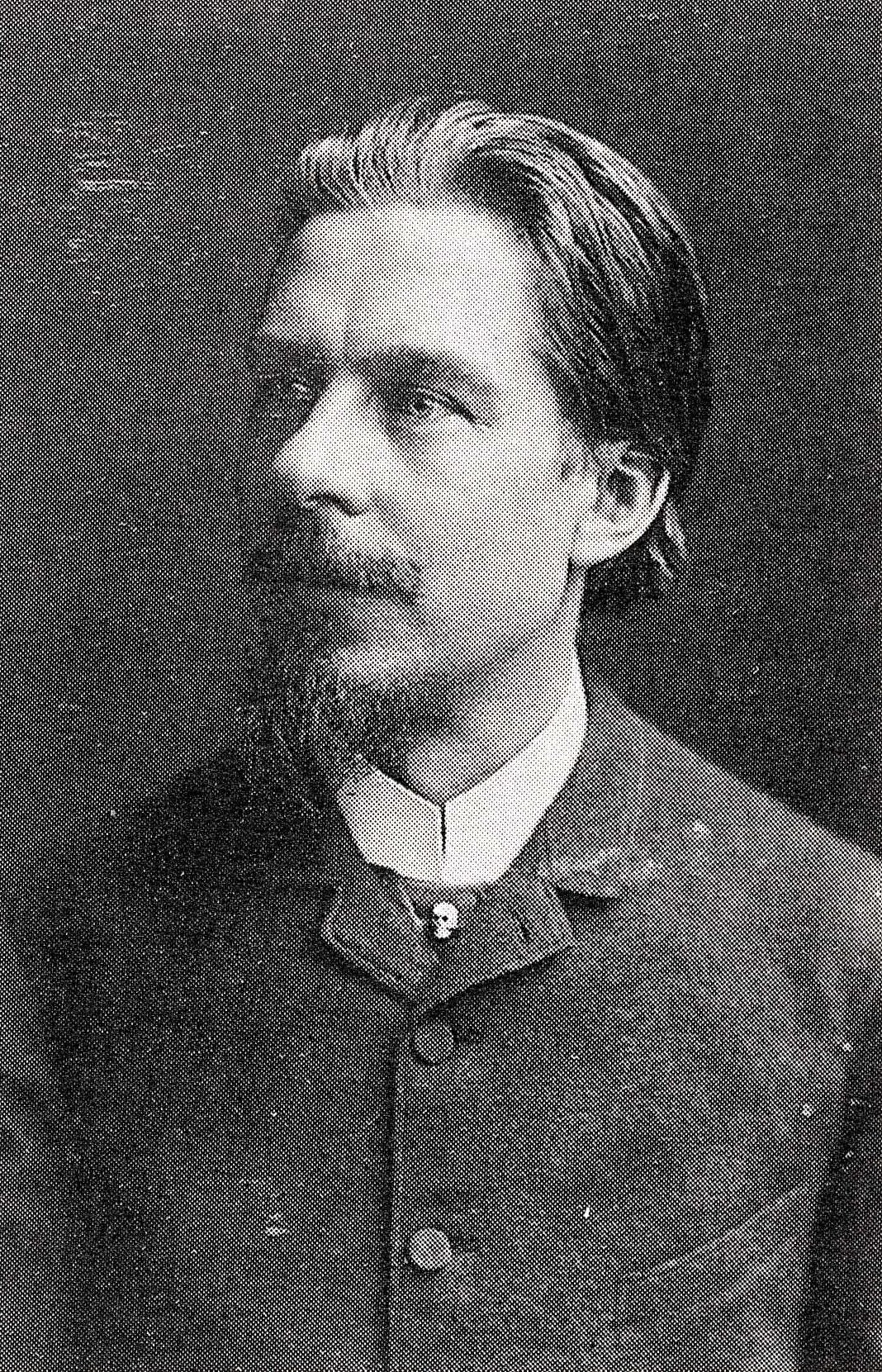 Luonnontieteilijä Aukusti Juhana Mela (1846–1904).